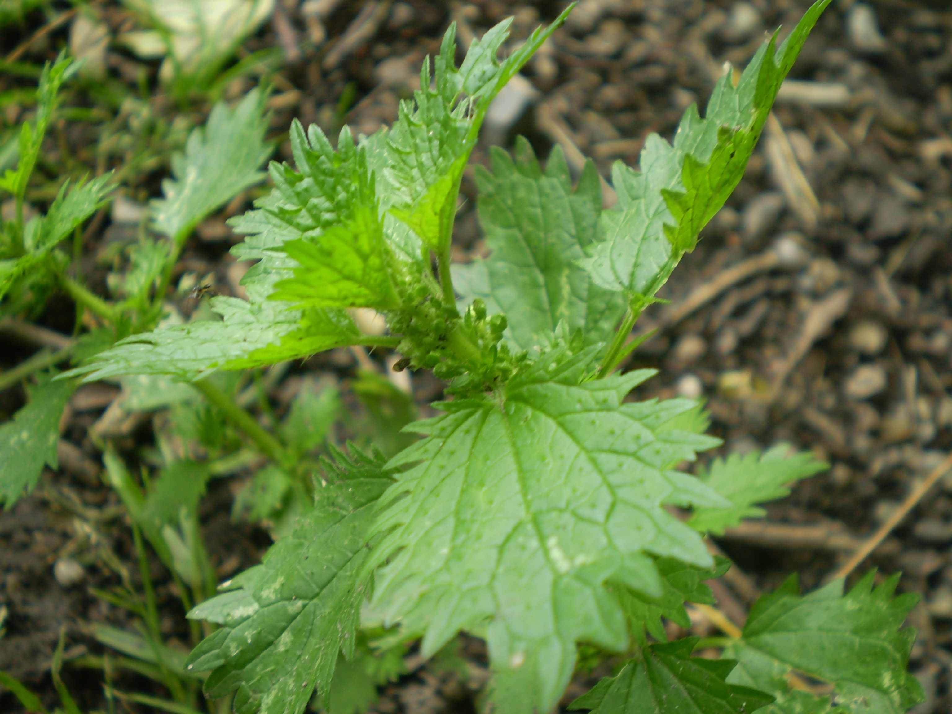 Urtica urens leaves